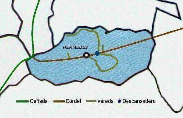 Término